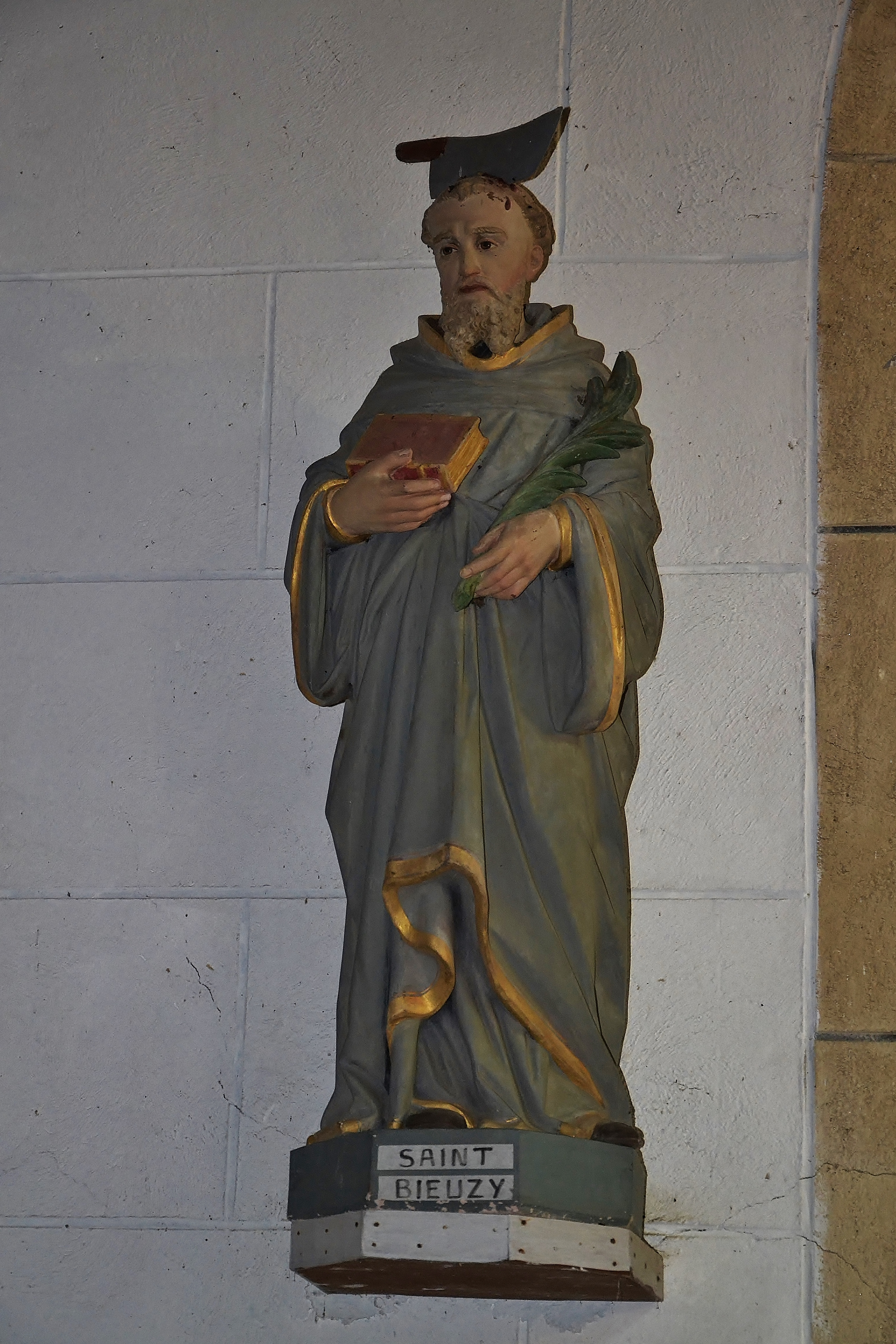 Statue de saint Bieuzy dans le chevet de la chapelle Saint-Gildas de Bieuzy